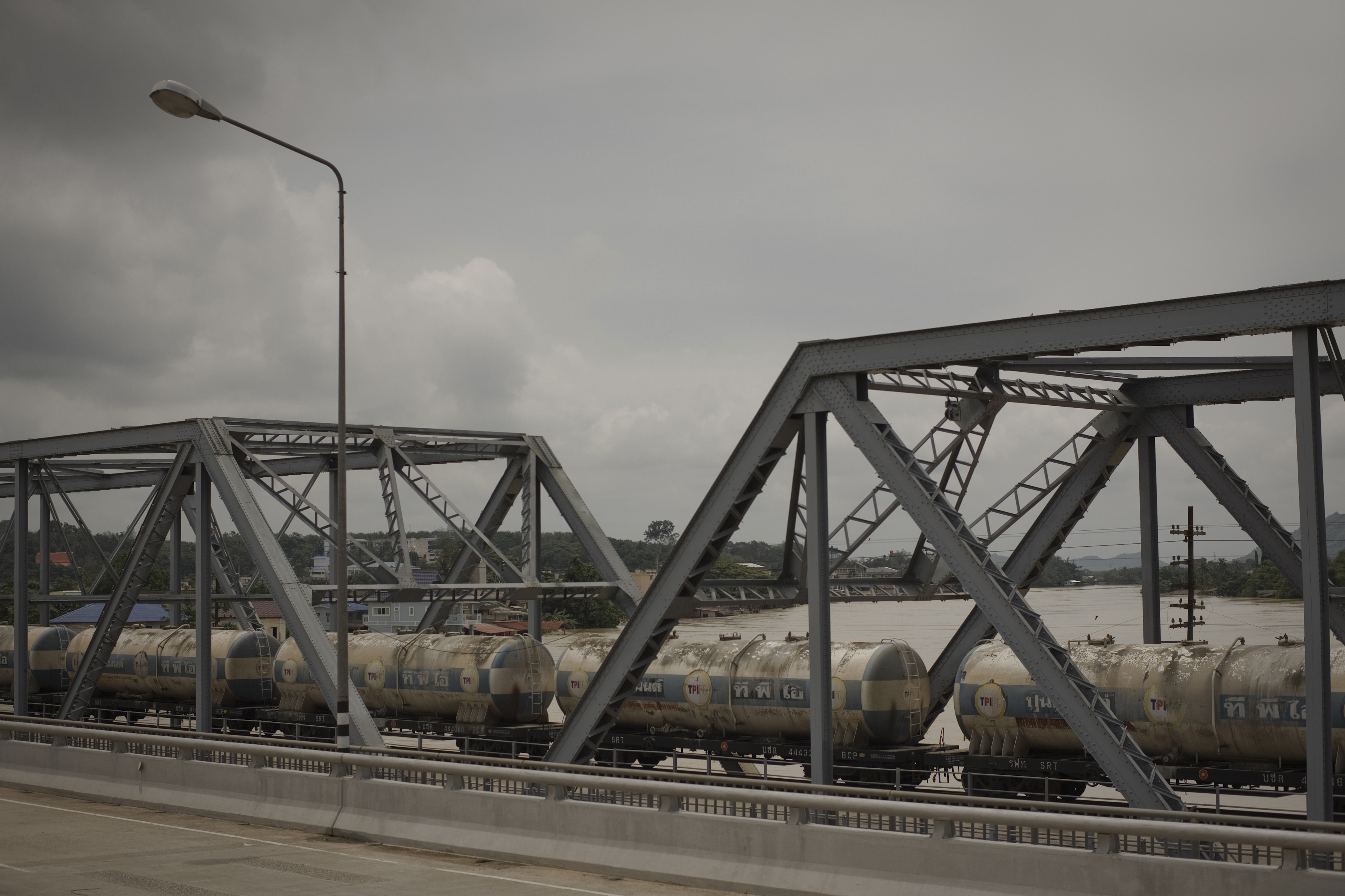 ภาพสถานการณ์น้ำท่วมภายในจังหวัดสุราษฎร์ธานี วันอาทิตย์ที่ 3 เมษายน พ.ศ.2554 (Photographer attached to the Prime Minister of the Kingdom of Thailand (H.E.Mr.Abhisit Vejjajiva) : Peerapat Wimolrungkarat / พีรพัฒน์ วิมลรังครัตน์) @is50mm